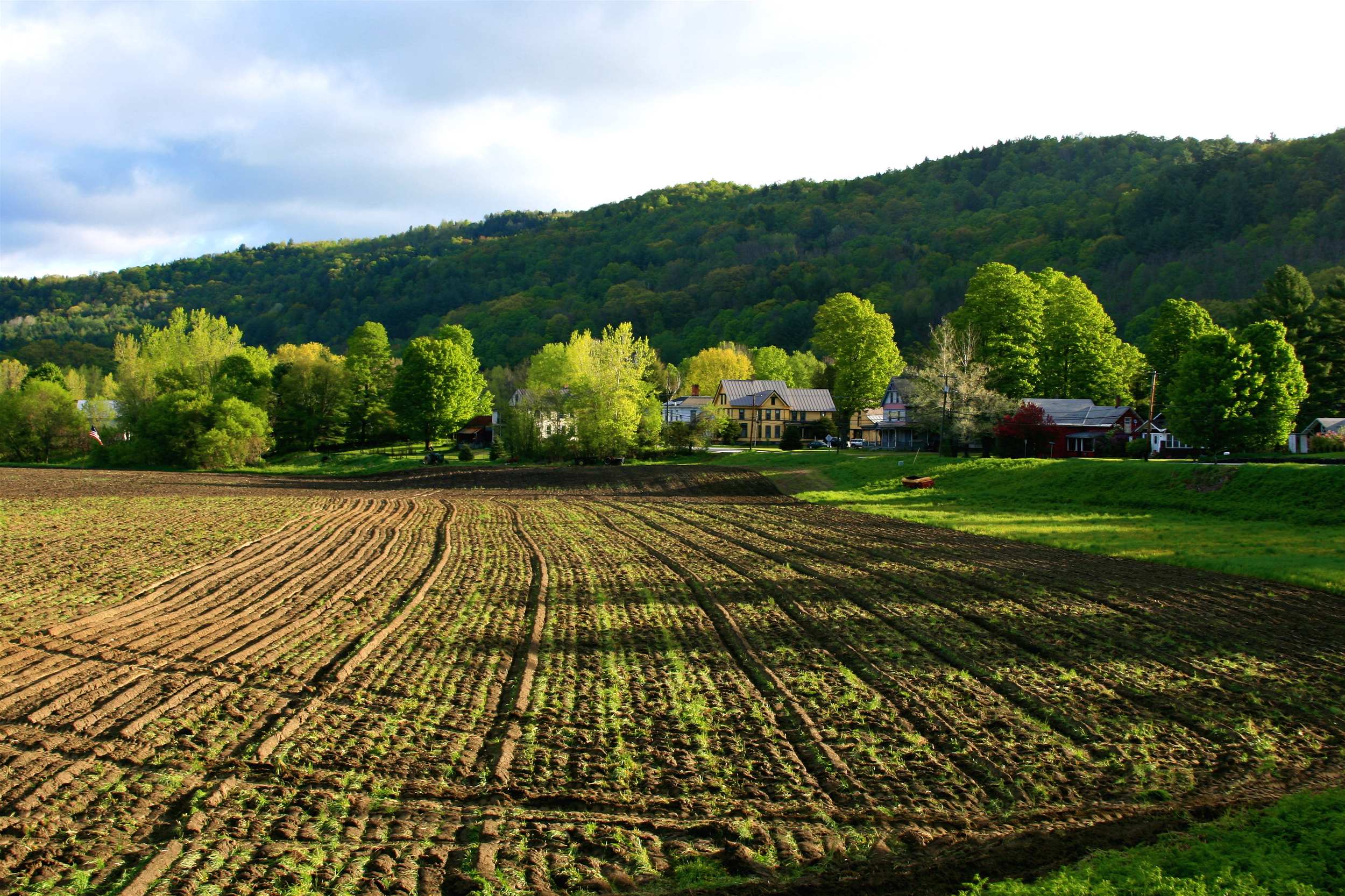 Spring Field in Bethel, Vermont